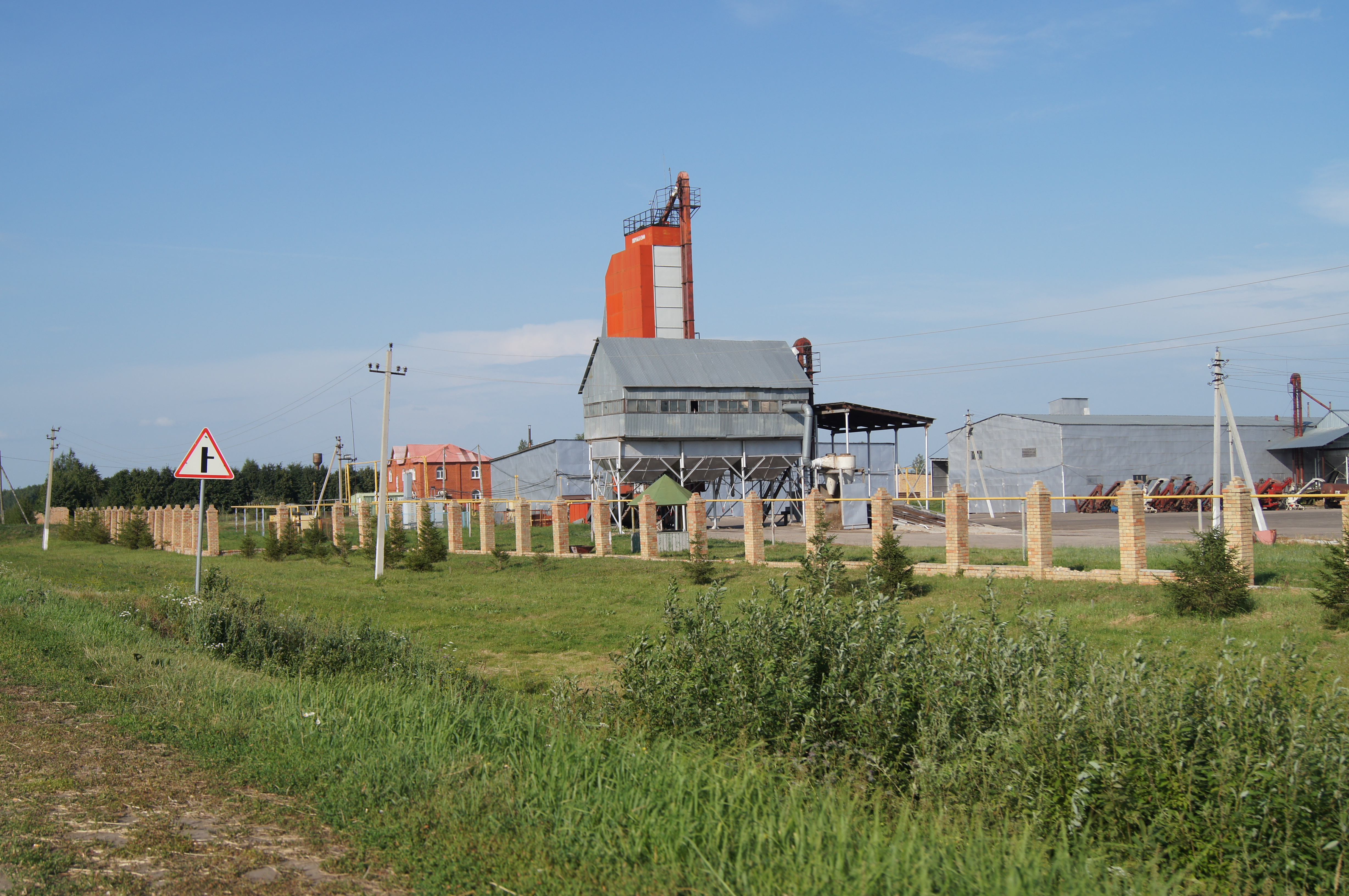 Большое Болдино, агрофирма «Подсобное хозяйство Пушкинское»